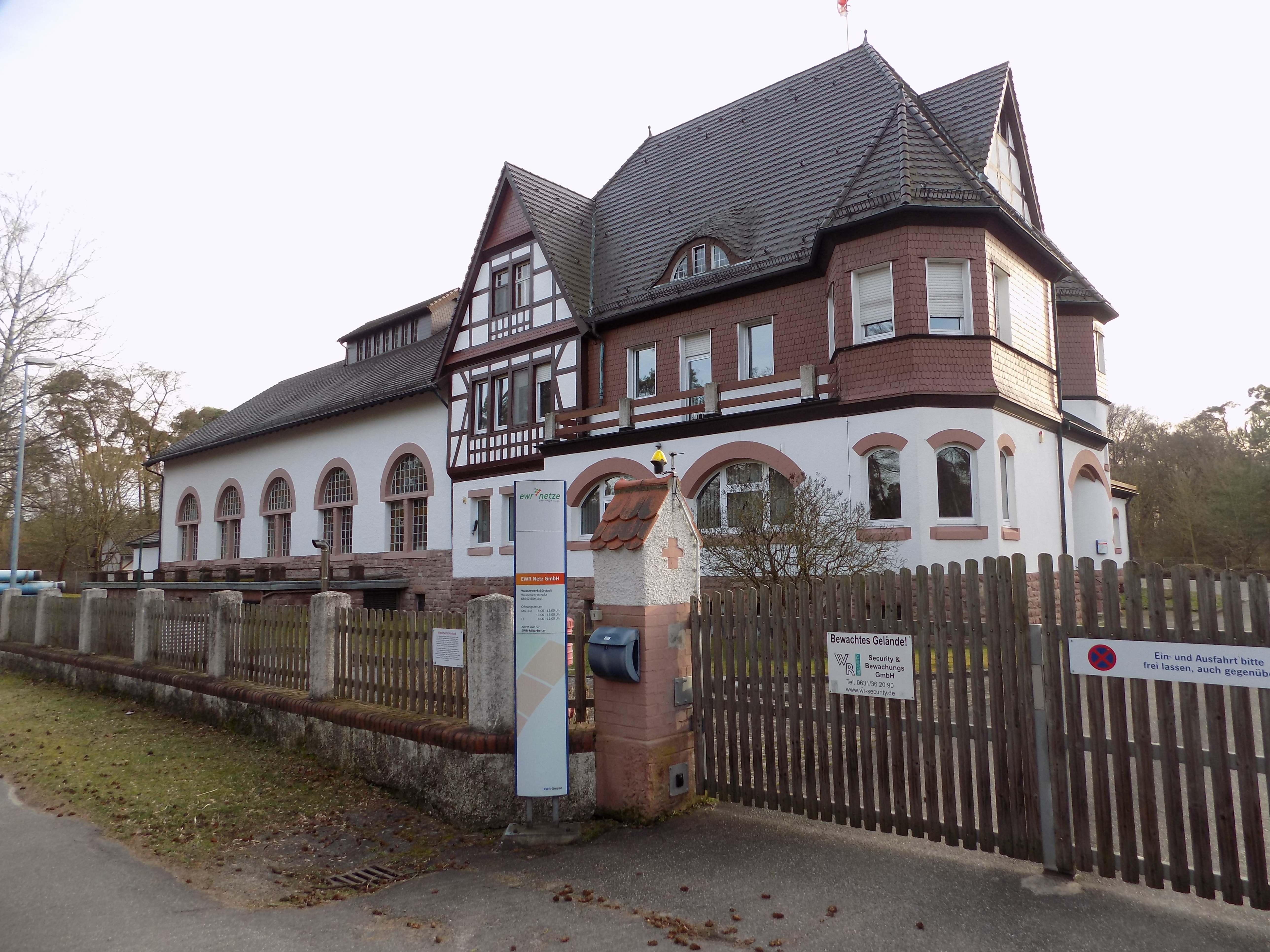 Wasserwerk Bürstadt - Ansicht Nord